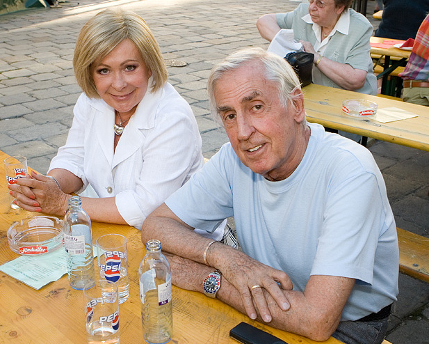 Brigitte Neumeister und Gatte